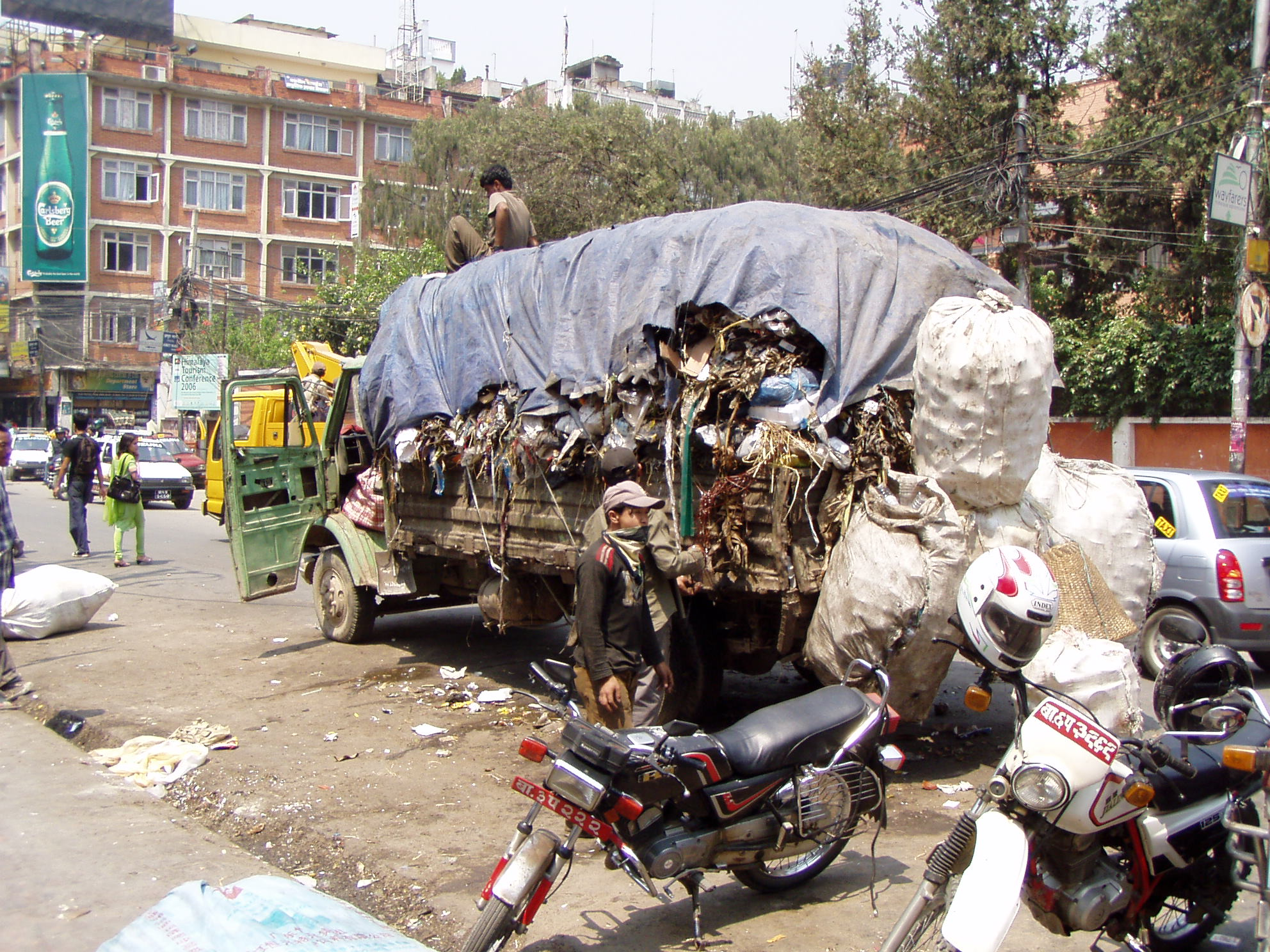 Städtische Müllabfuhr in Kathmandu (Nepal)